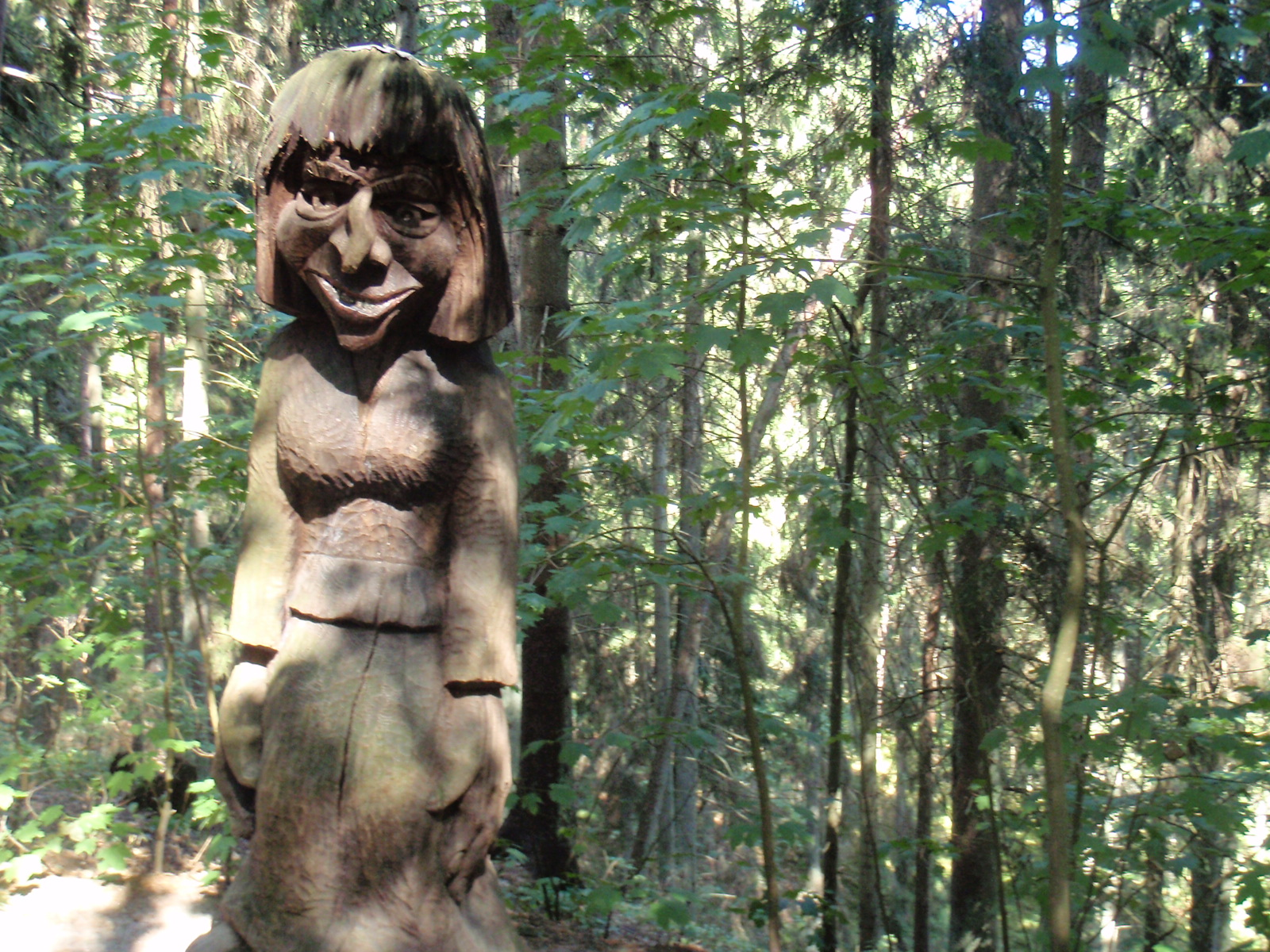 Romo Vencko 1980 m. skulptūra „Laumė/Geroji ragana“